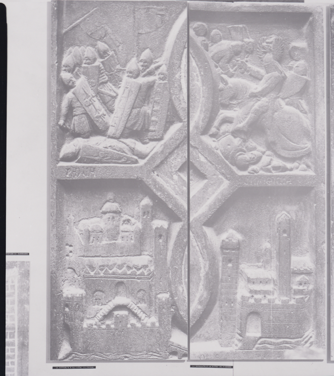 Servizio fotografico : Verona, 1972 / Paolo Monti. - Buste: 2, Fototipi: 2 : Negativo b/n, gelatina bromuro d'argento/ pellicola ; 9x10. - ((Serie costituita da 2 buste di negativi identificati con i nn.: 11463, 11464, e tenuta insieme da una graffetta alla serie R11446-11462. - Il negativo 11463 è tagliato a metà. - I negativi sono riproduzioni di negativi. - La suddetta serie è contenuta nella scatola R11270-11576, formato 18x24, e identificata con l'iscrizione didascalica manoscritta a pennarello: "Località varie/ n. 3". - La suddetta serie è contenuta nella scatola R11270-11576 e identificata con l'iscrizione didascalica manoscritta a pennarello nero: "Località varie". - Occasione: Documentazione per la pubblicazione: Brugnoli Pier Paolo, "Nella bella Verona", Bologna, Cappelli, 1972. - Fonte: Monografia di Brugnoli, Pier Paolo: Nella bella Verona, Bologna, Cappelli (1972)